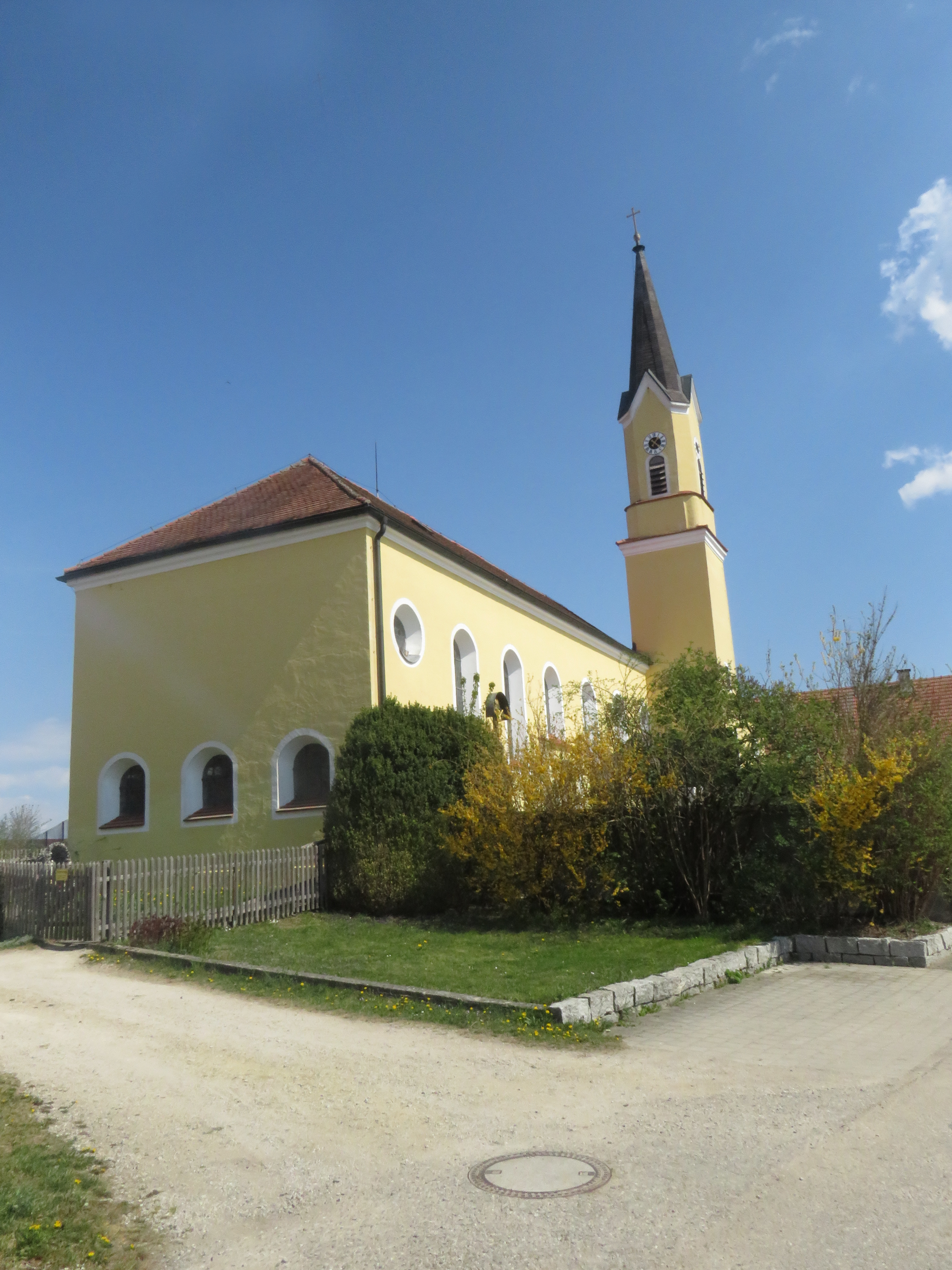 St. Nikolaus (Wippenhausen) - Außenansicht